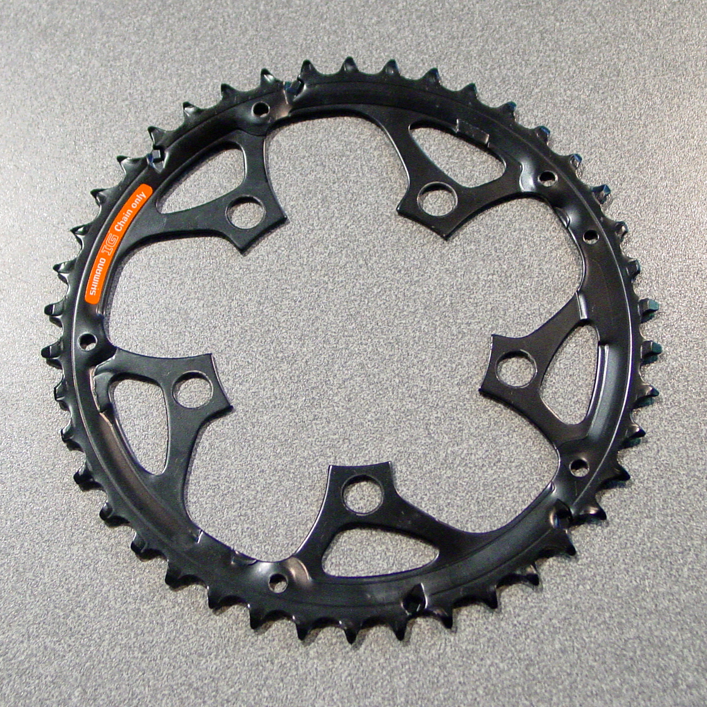 Fahrradtechnik